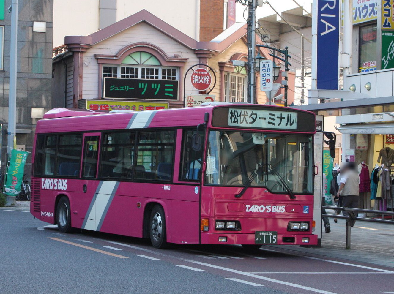 ジャパンタローズバス 新越谷駅東口にて